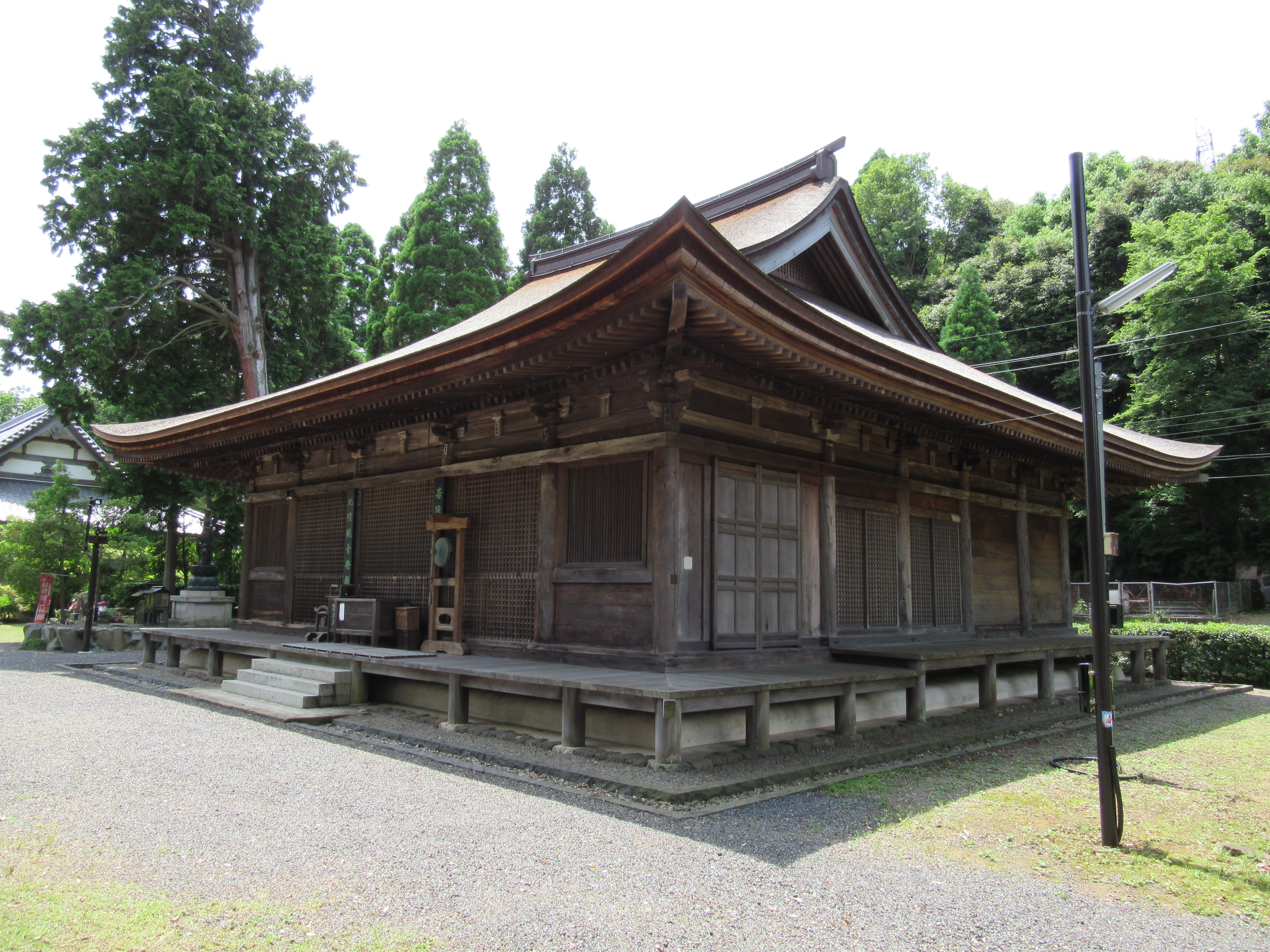 中山寺本堂